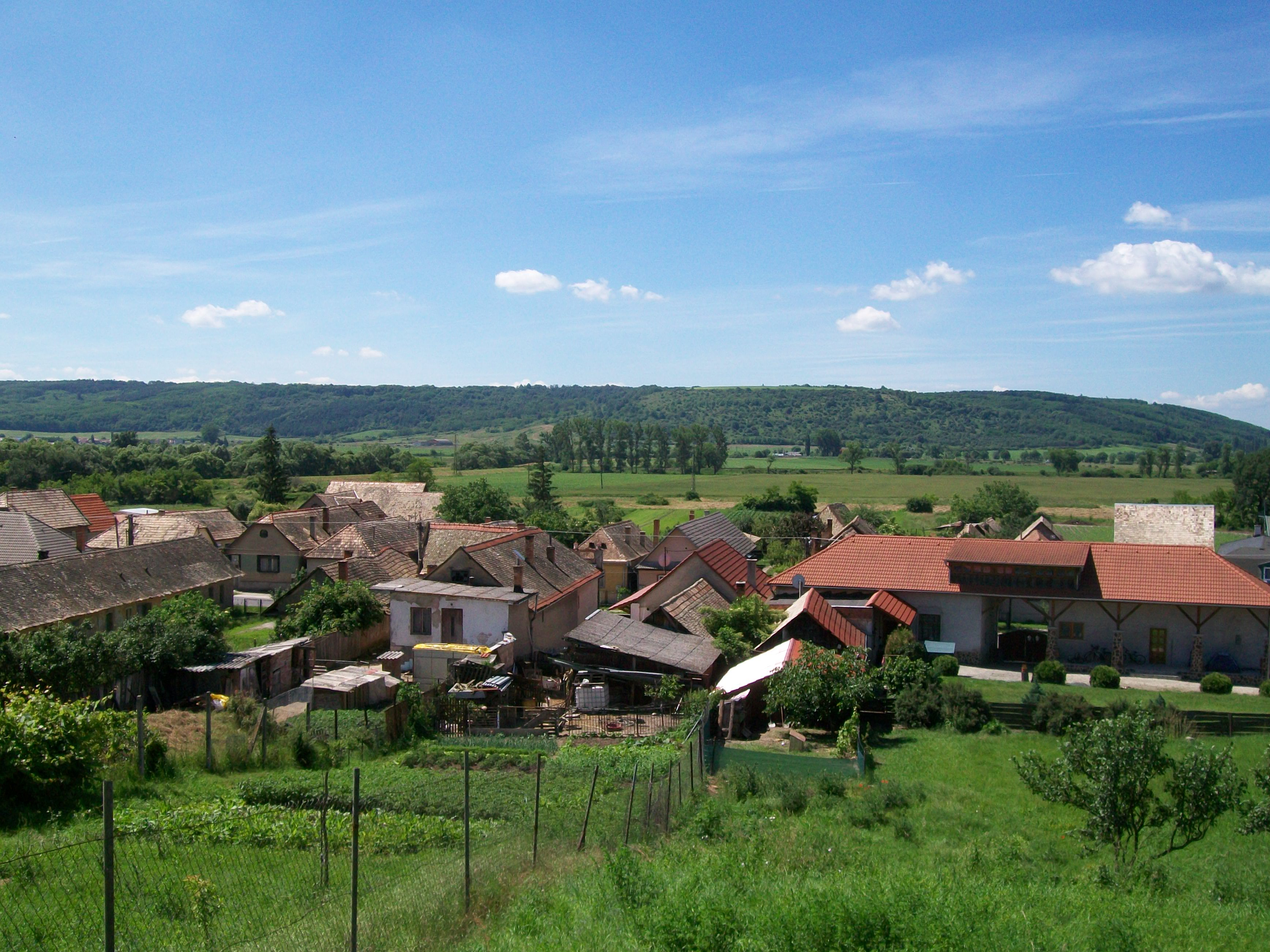 Pohľad na Holišu